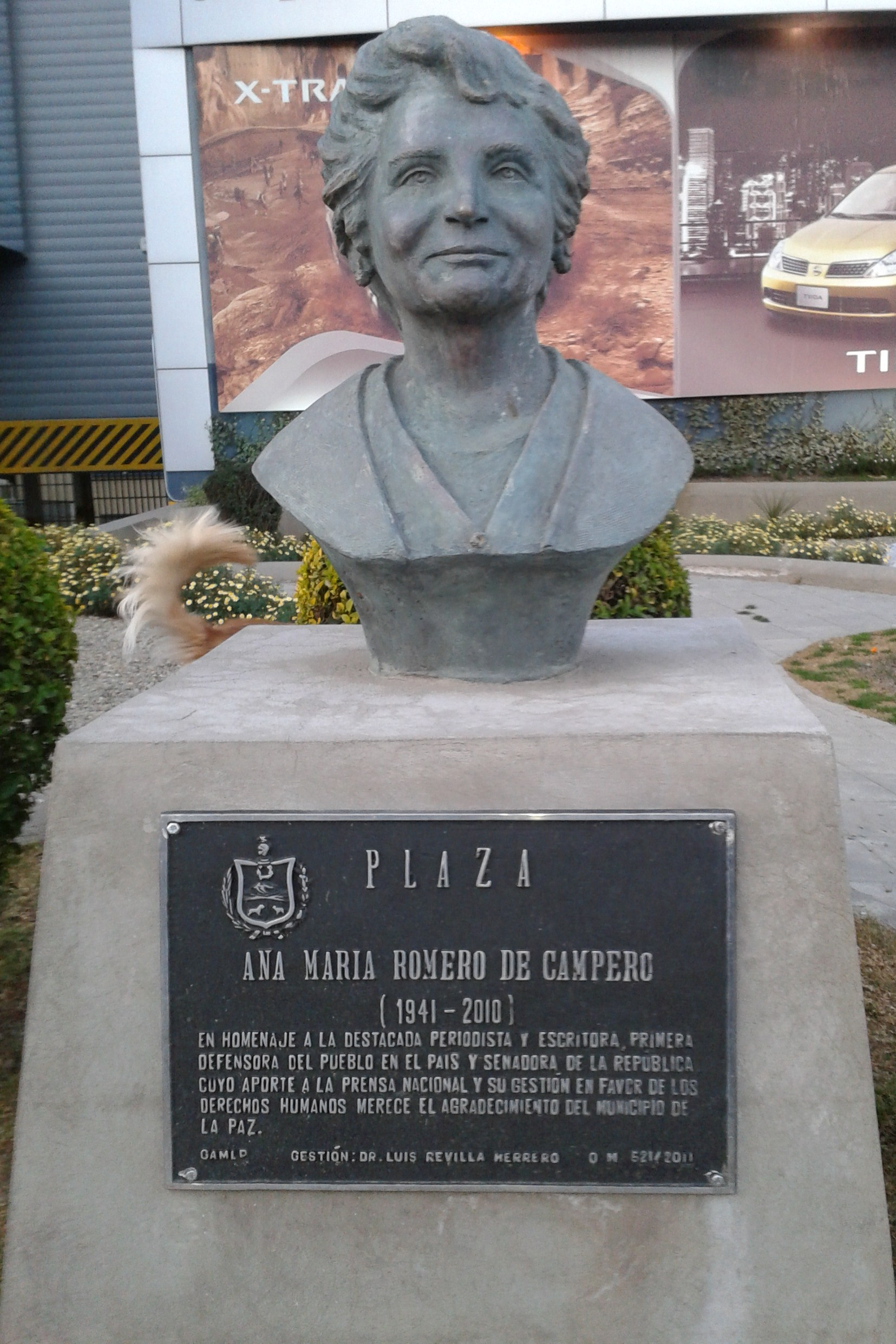 Plaza AMRC